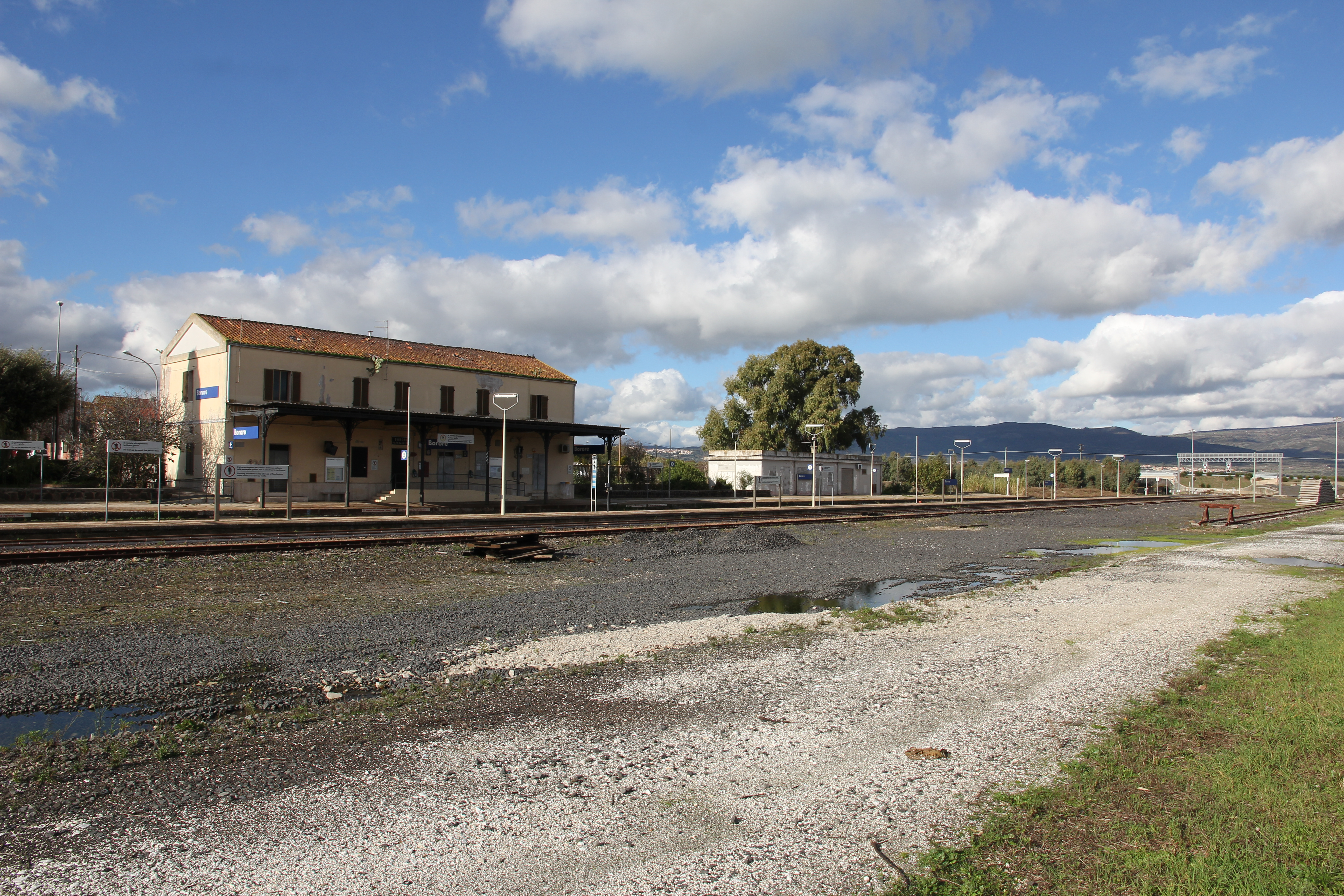 Borore, stazione ferroviaria